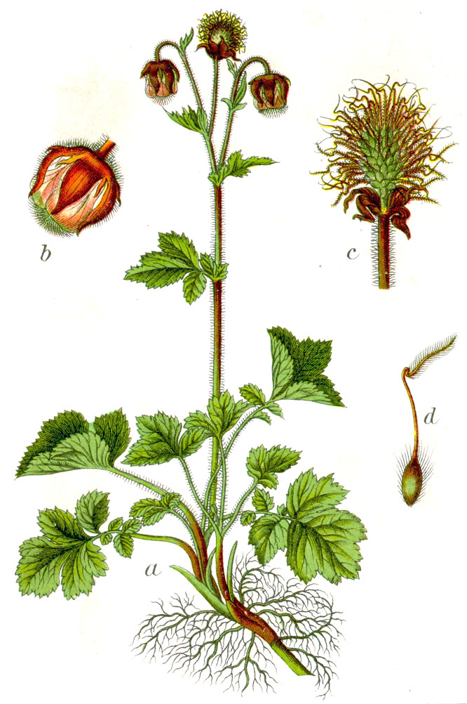 Geum rivale L. Original Caption Wasser-Nelkenwurz, Geum rivale